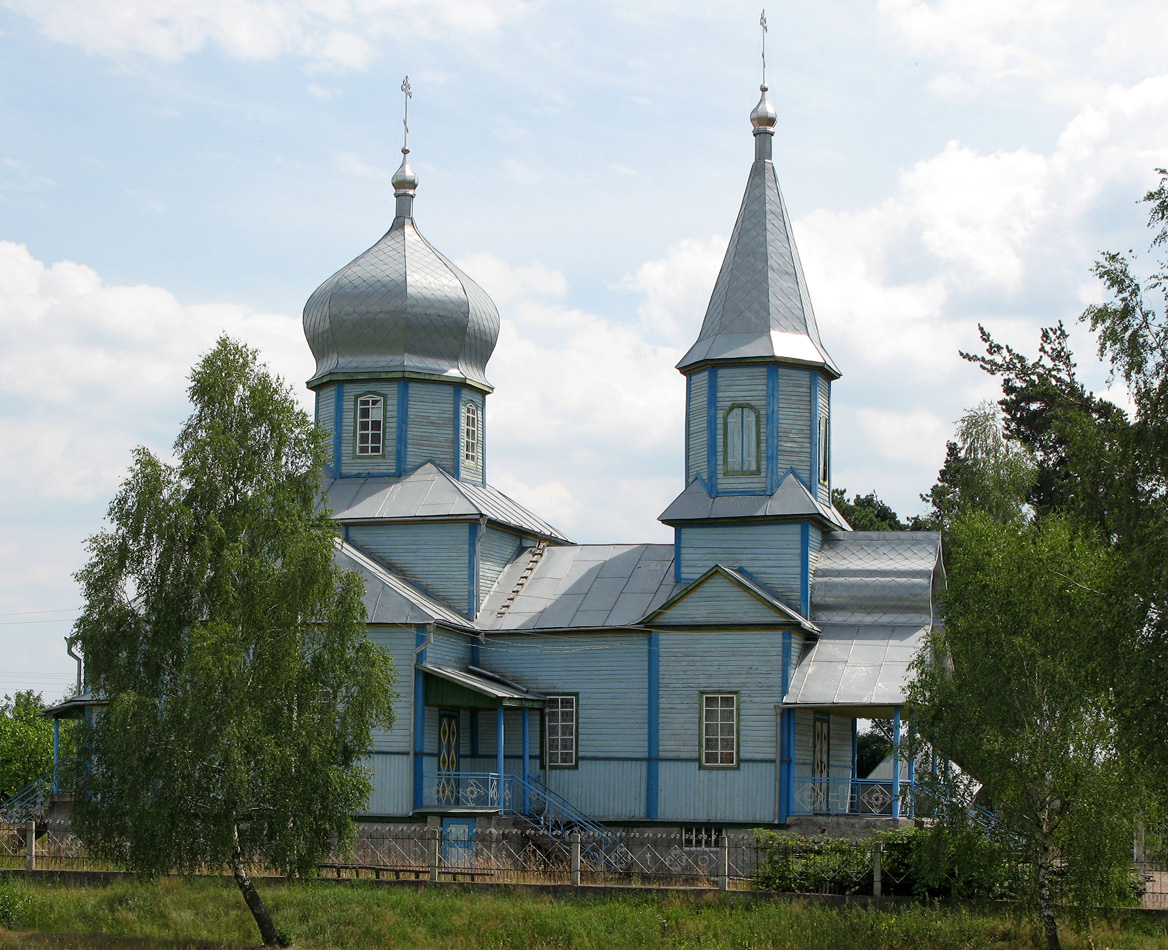 Horshchyk, Zhytomyrs'ka oblast, Ukraine